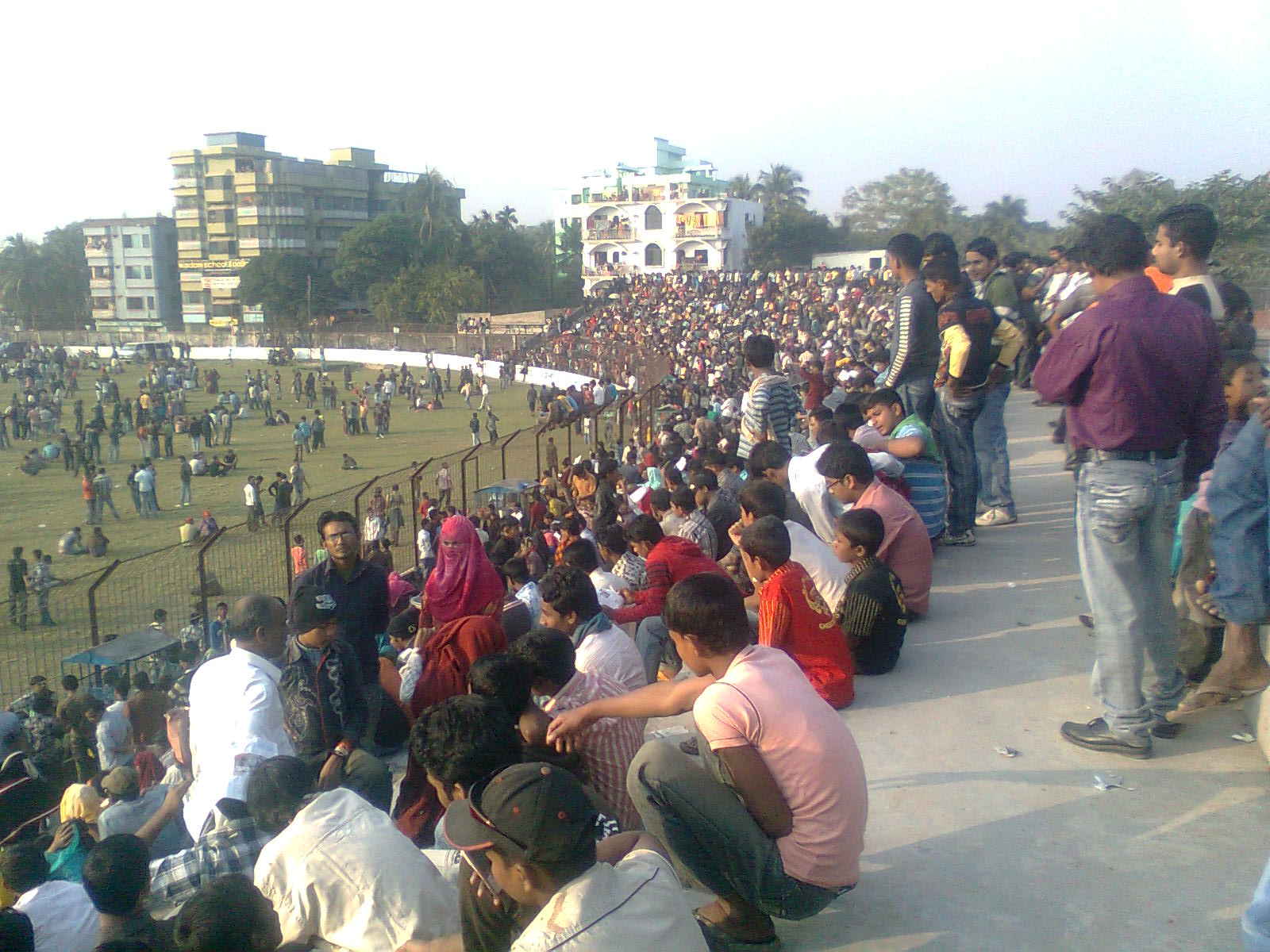 নিয়াজ মোহাম্মদ স্টেডিয়ামের গ্যালারি